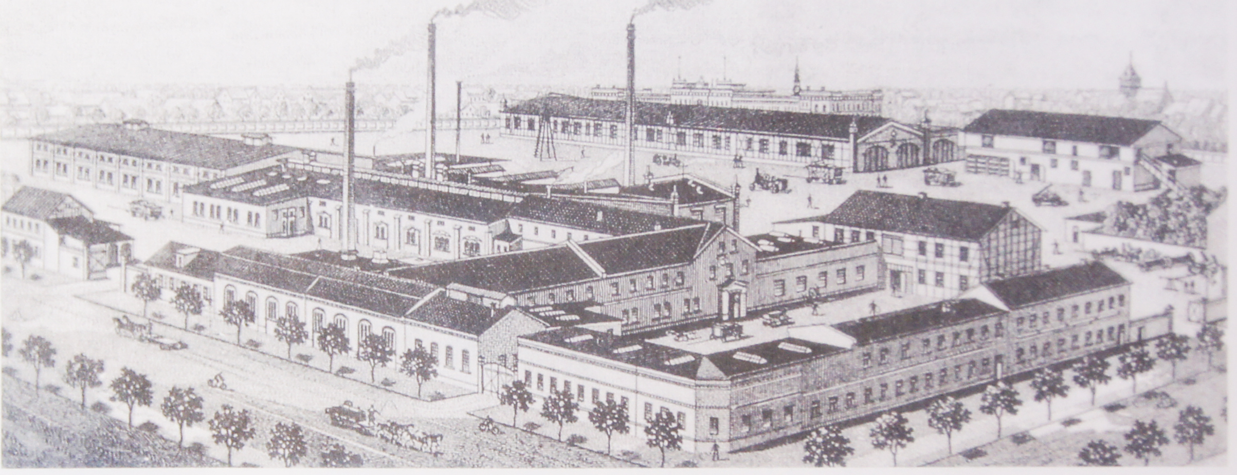 Die Kesslerschen Maschinenfabriken und die Naxö- Kaserne im Hintergrund